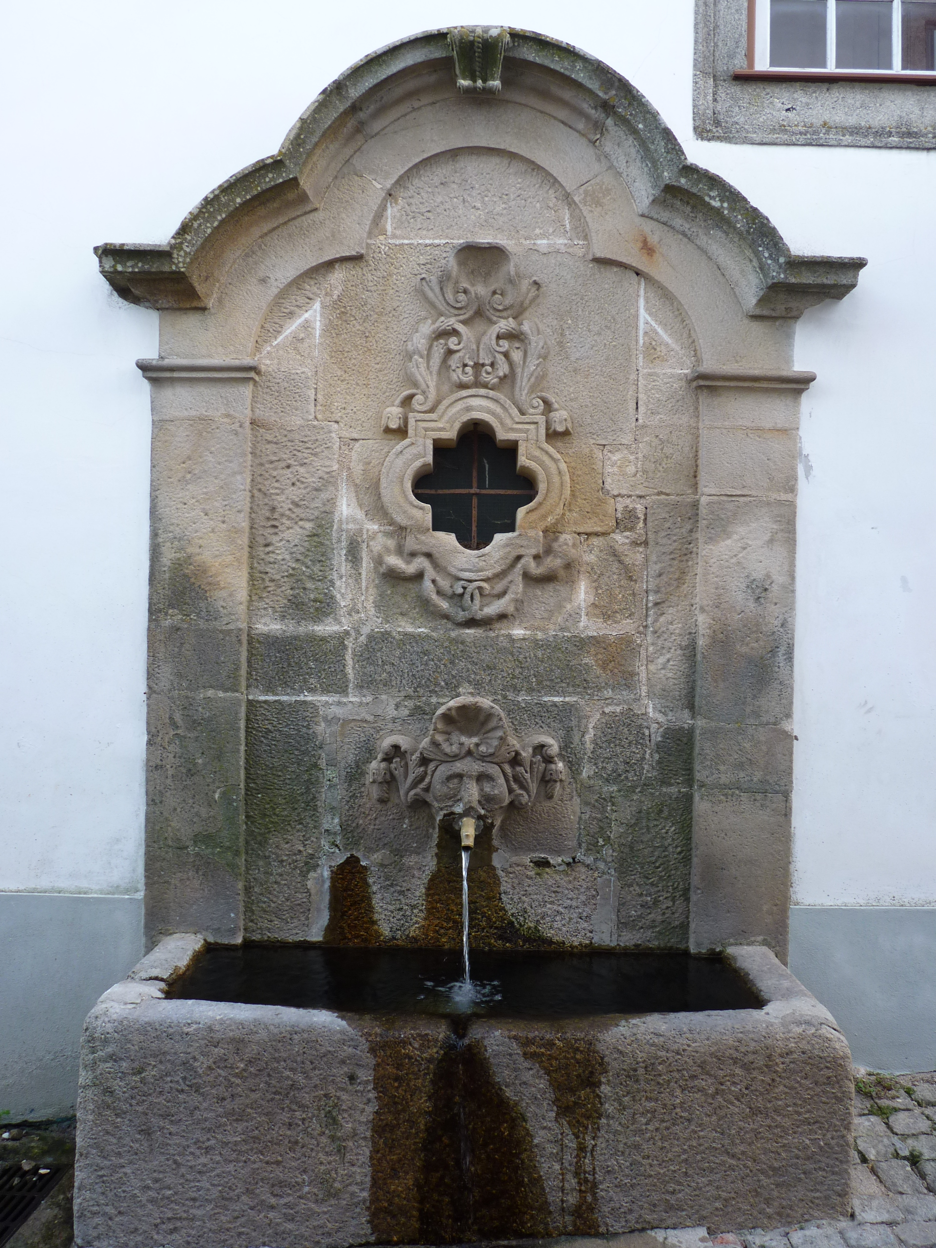 Aldeia Velha de Monsanto This monument is classified as Imóvel de Interesse Público. This file was uploaded for Wiki Loves Monuments in Portugal with the unique identifier 74233.